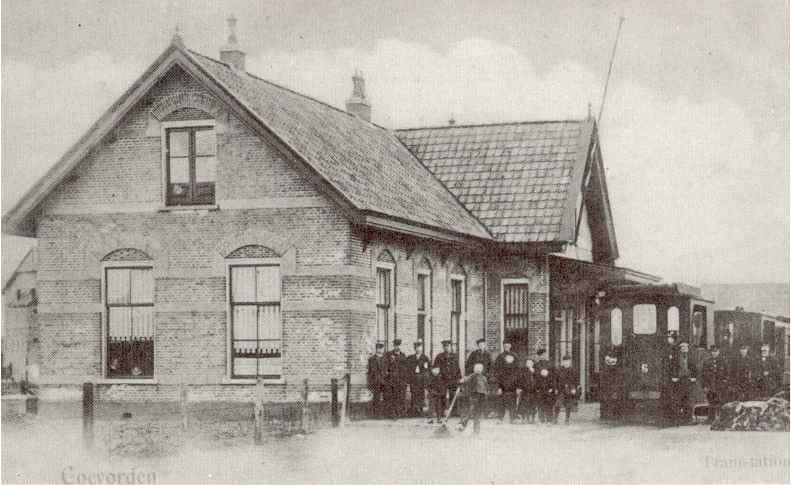 Reproductie van Ansichtkaart uit 1906 van het station van de Dedemsvaartsche_Stoomtramweg-Maatschappij te Coevorden. Naast het station staat een tram met de locomotief nr 6 "Coevorden". Maker van de ansichtkaart is onbekend. Een reproductie is een niet creatieve herproductie en daarom kan deze afbeelding tot publiek domein gerekend worden vanwege de leeftijd